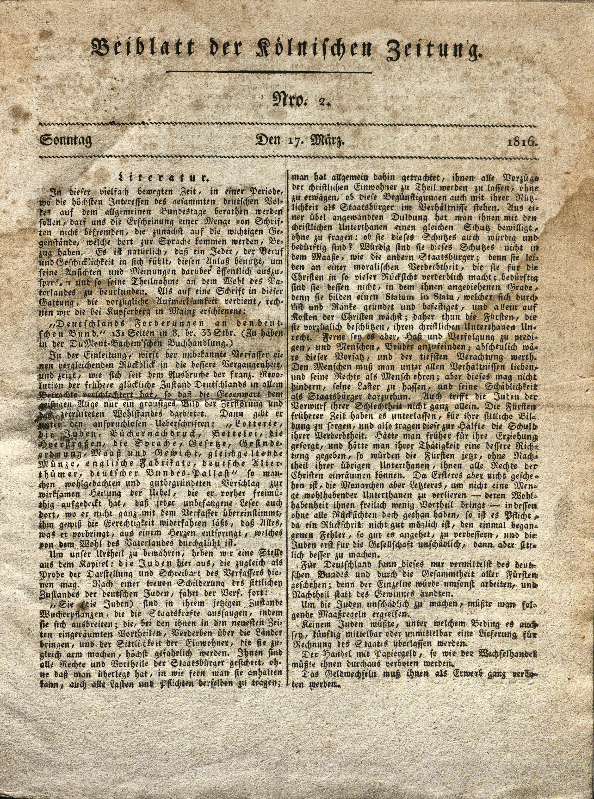 Erste Seite der Beilage zur Kölnischen Zeitung vom 17. März 1816 mit einem antisemitischen Artikel.